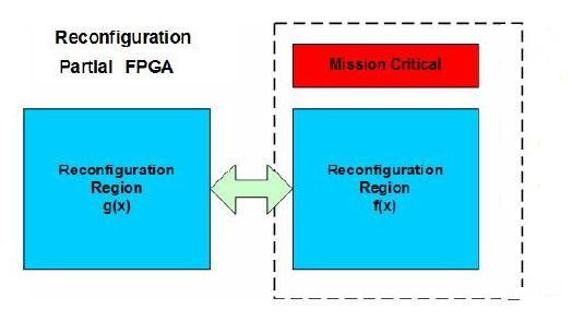 RTR Partielle